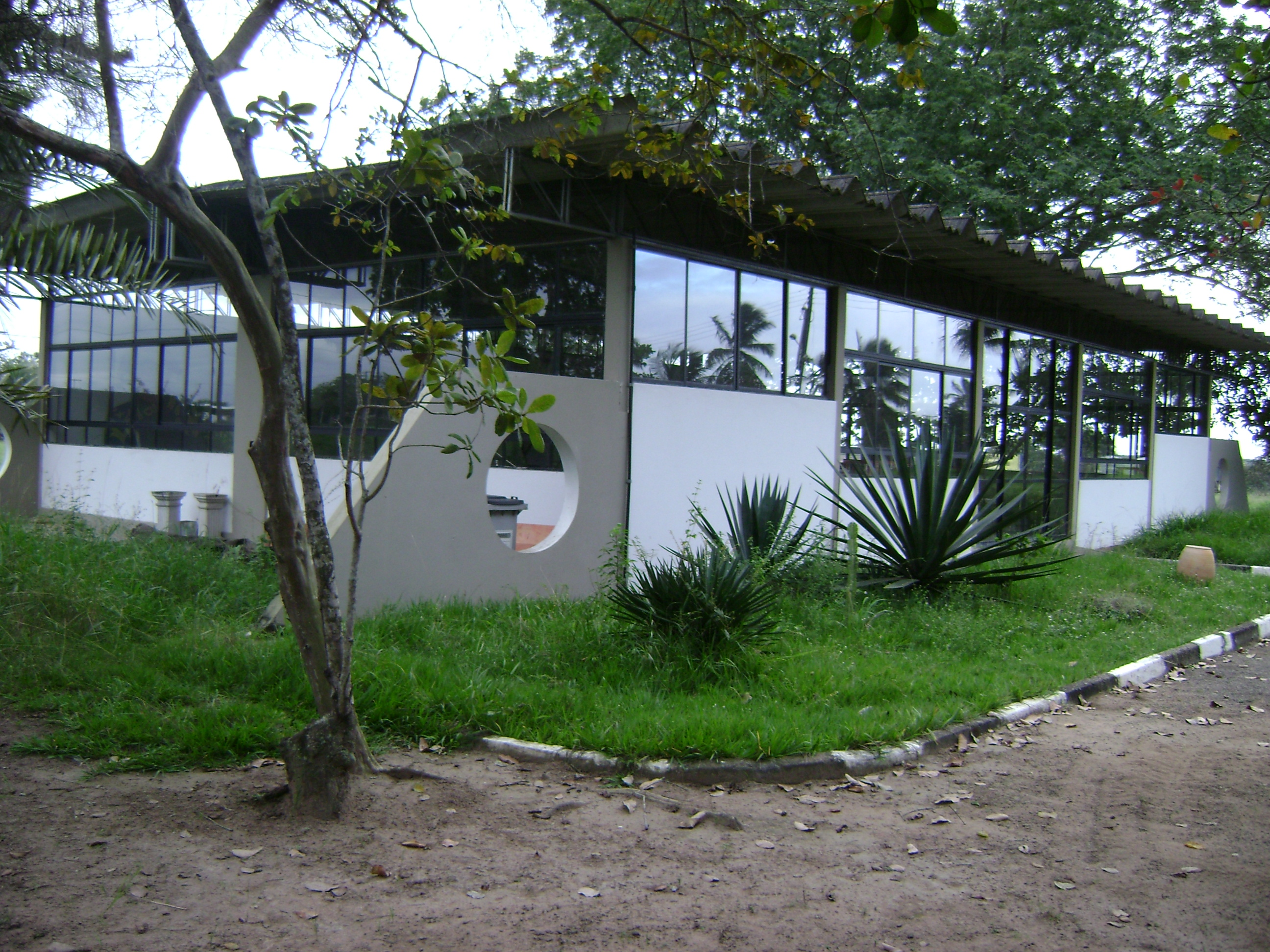 Museu Casa do Sertão, na Universidade Estadual de Feira de Santana.